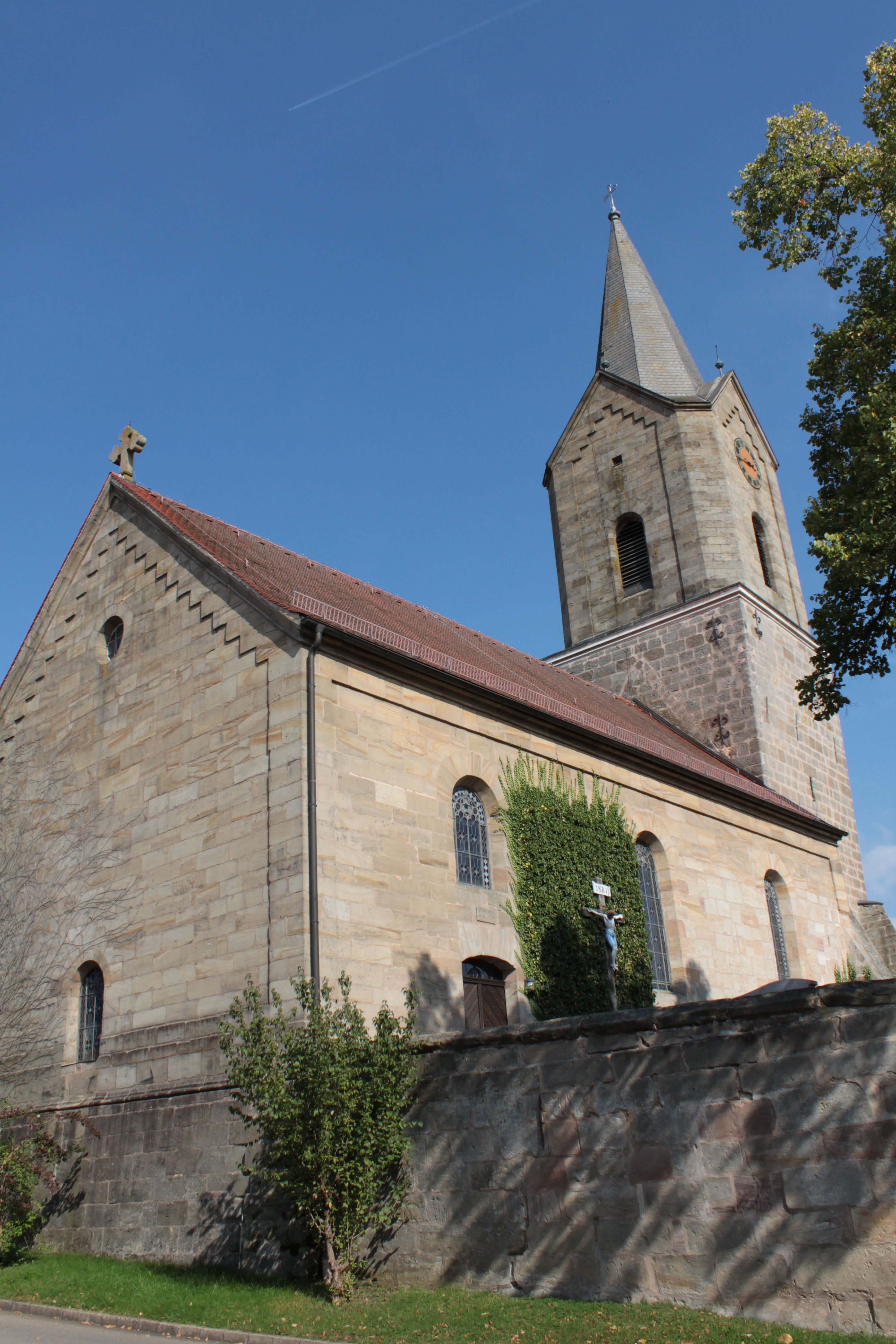 Pfarrkirche Mariä Himmelfahrt, südwestliche Ansicht